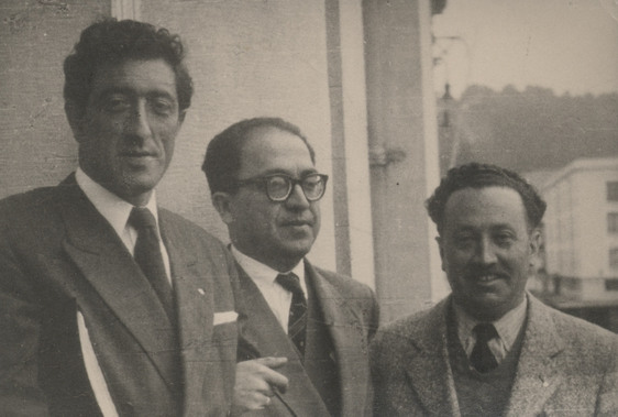 Salomón Corbalán junto a personalidades políticas.